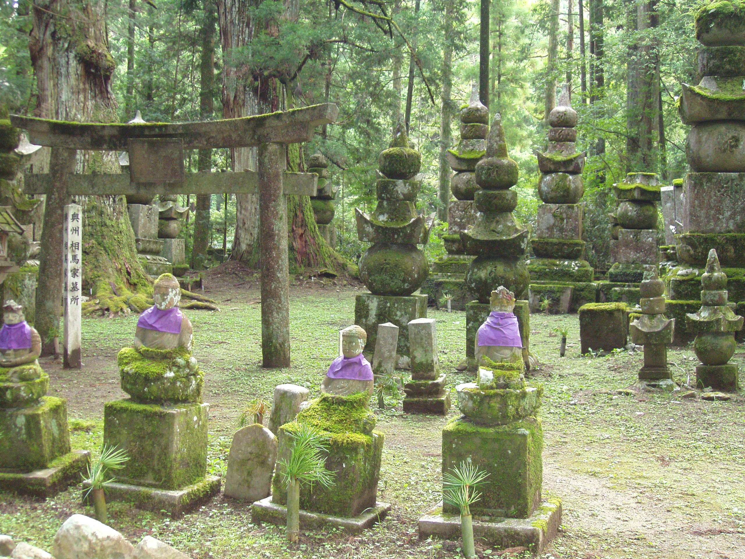 Okunoin Cemetery, Koyasan, Wakayama prefecture, Japan.